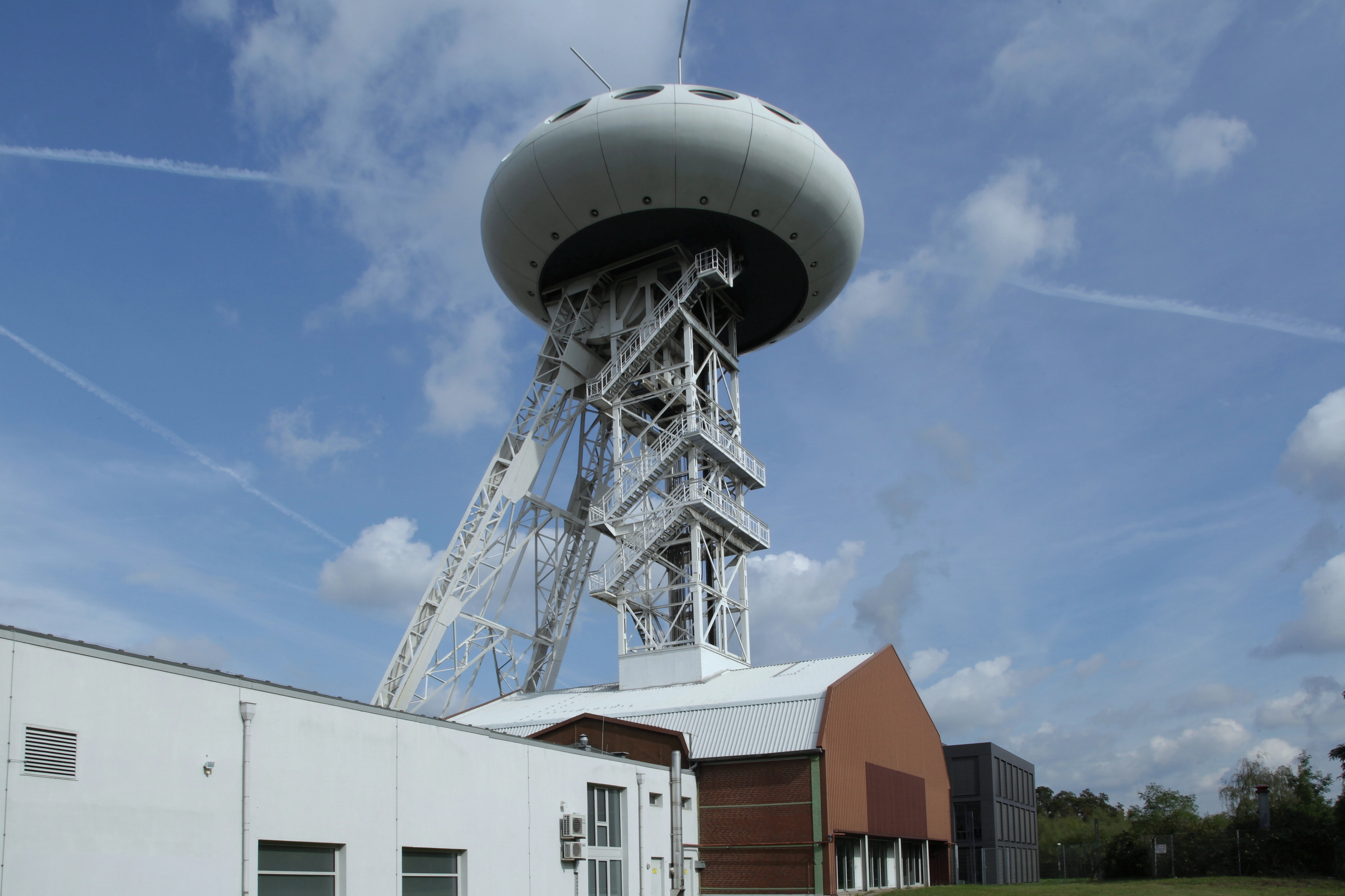 Lüntec-Tower, Förderturm mit Colani-Ei über Schacht 4 der Schachtanlage 4 von Zeche Minister Achenbach, Am Brambusch in Lünen